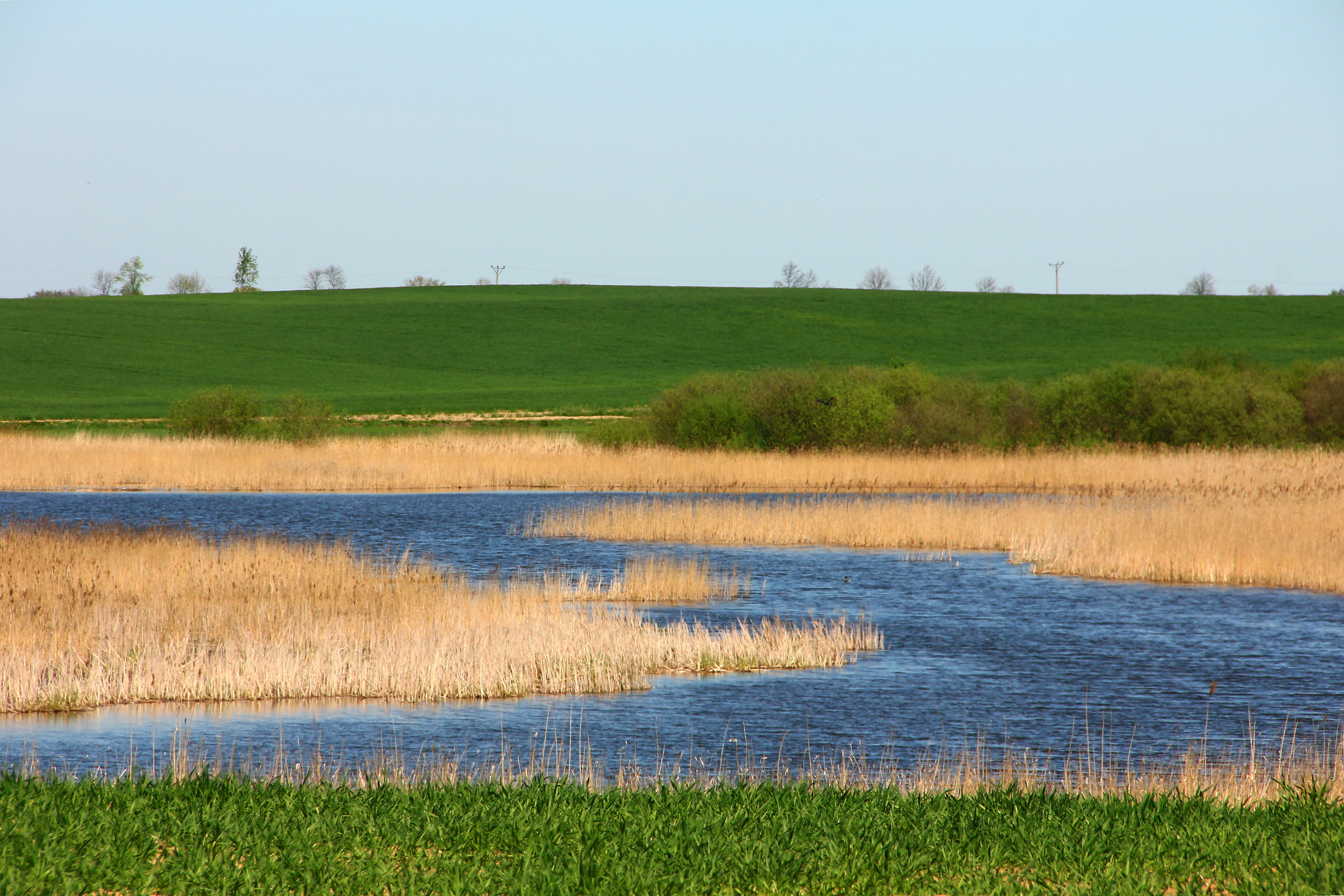 Eutrofizujące Jezioro Kinkajmskie koło Bartoszyc.